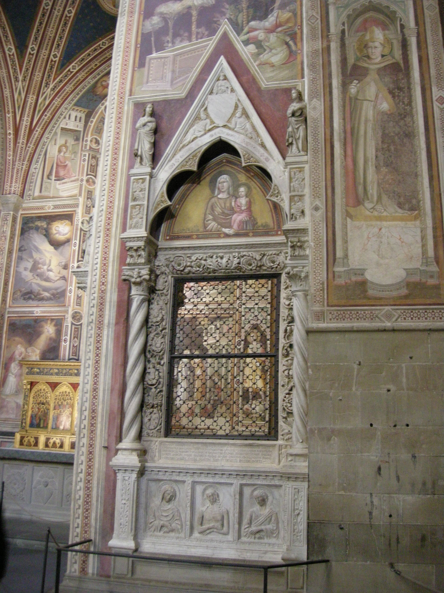 Cappella baroncelli, ext 01, monum. di giovanni di balducci 1327.JPG